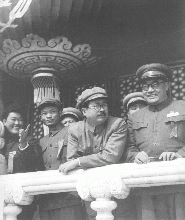 1950年10月1日，李涛、任弼时、冯文彬、李凤莲在天安门城楼观礼。